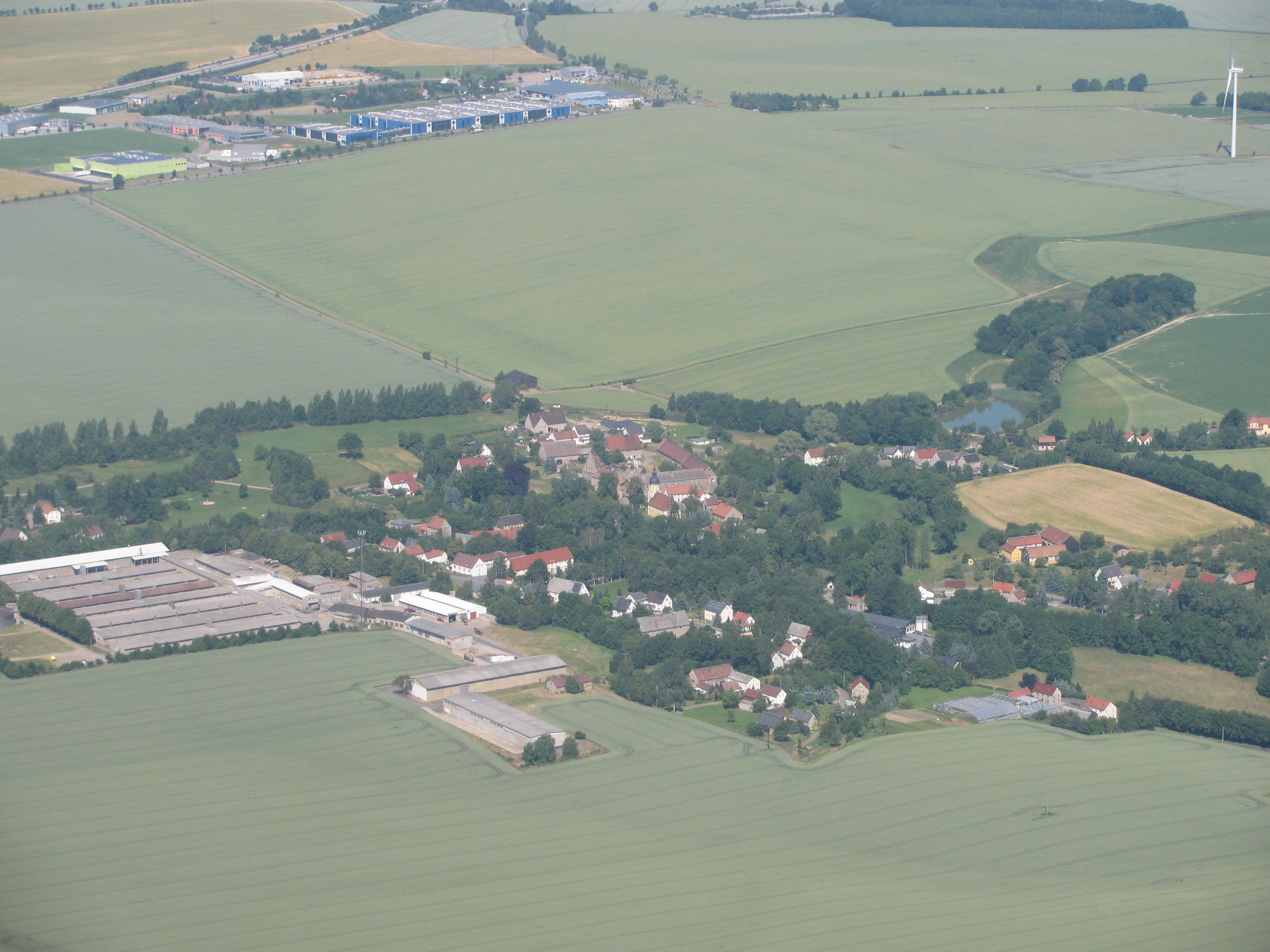 Luftbild Deutschenbora, Nossen